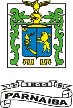 Brasão da Cidade de Parnaíba - Piauí